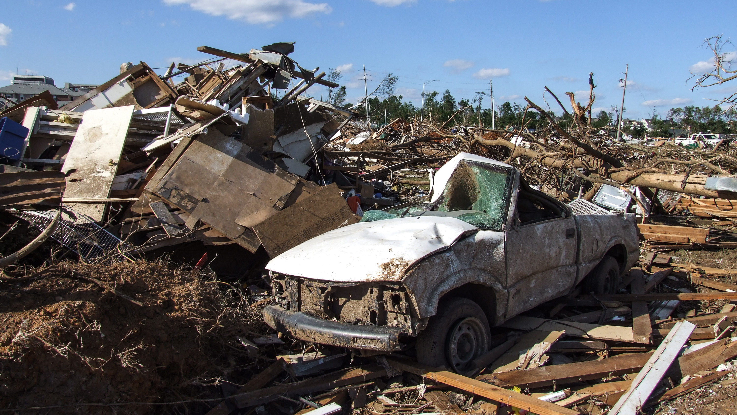 Aufnahme entstand am Tag nach dem F4-Tornado am McFarland Boulevard in Tuscaloosa, Alabama, USA. Blickrichtung Süd-West nach Nord-Ost.